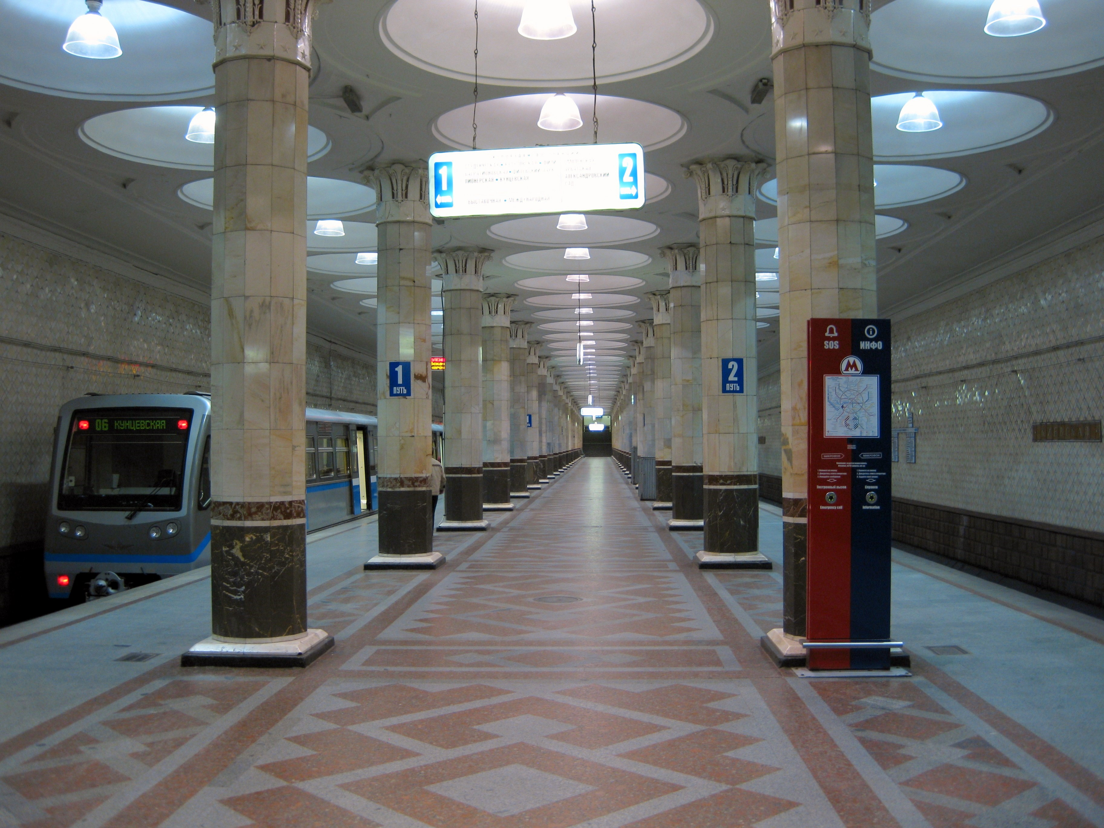 Станция метро «Киевская» Филёвской линии Московского метрополитена.